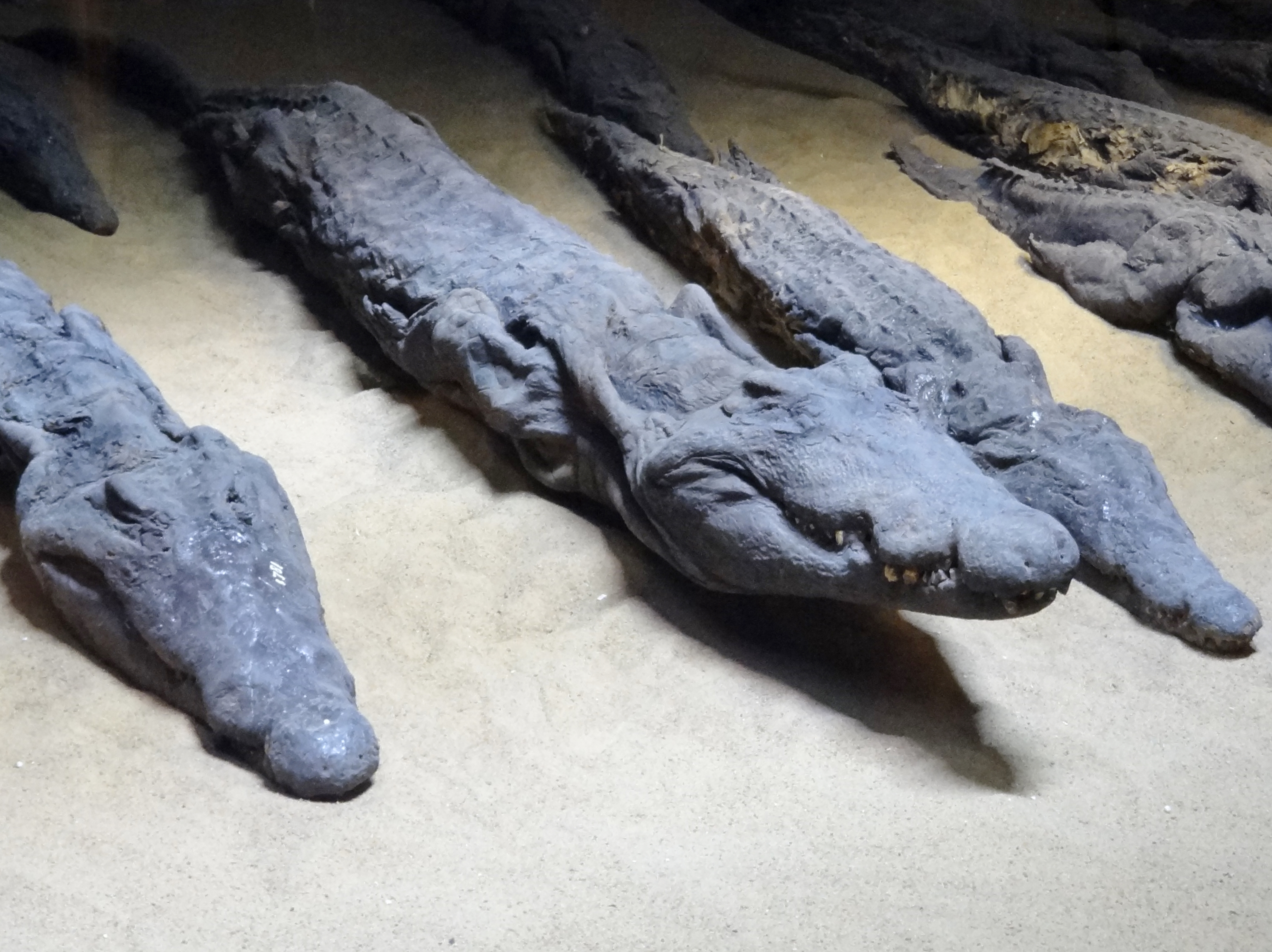 Mumifizierte Krokodile im Krokodilmuseum von Kom Ombo, Ägypten